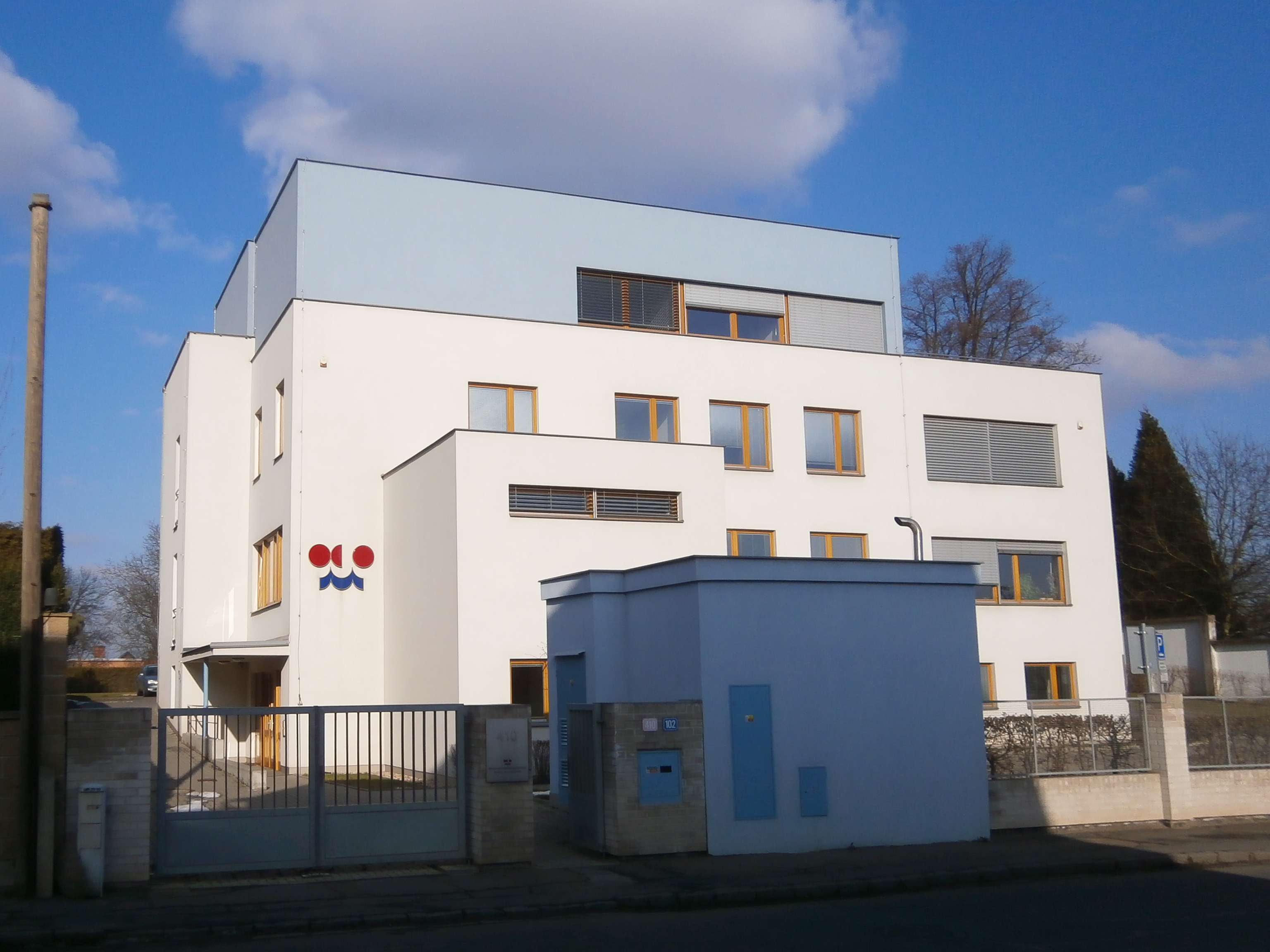 Český hydrometeorologický ústav, Dvorská 410/102, Hradec Králové-Svobodné Dvory.